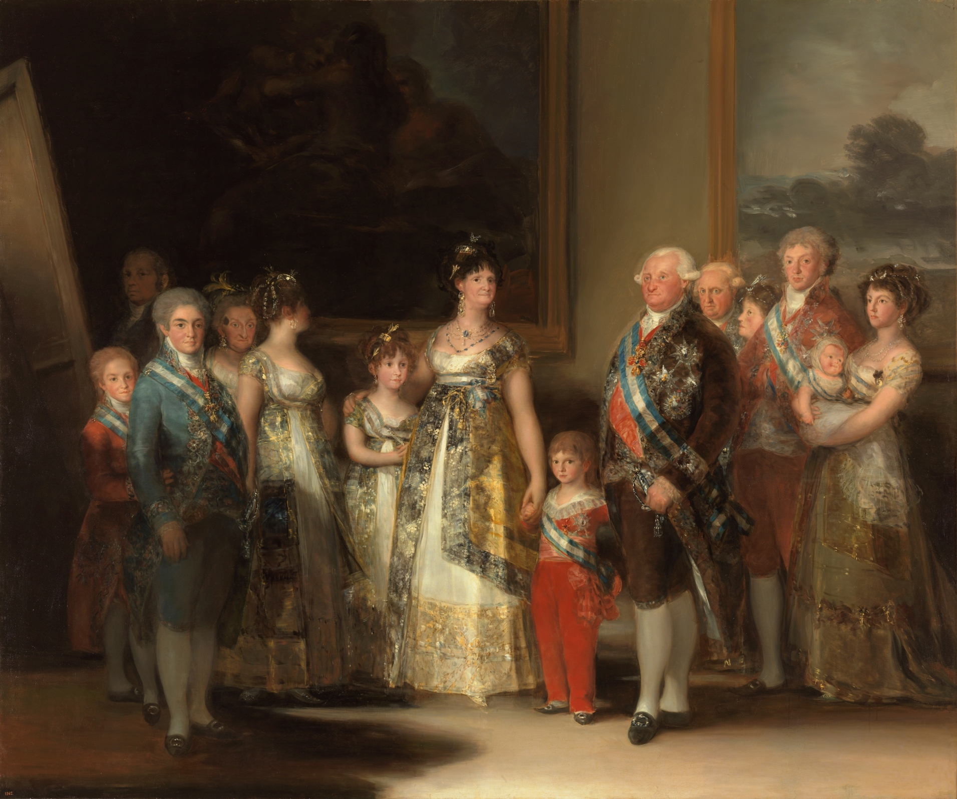 Aparecen Goya, los infantes Carlos María Isidro, Francisco de Paula, Carlota Joaquina, María Josefa, María Luisa, Gabriel Antonio, Carlos Luis. También se observa a Luis de Etruria, esposo de María Luisa. Ésta carga en brazos a su hijo Carlos Luis. Otras figuras son los reyes Carlos IV y María Luisa de Parma, el príncipe Fernando y su esposa María Antonieta.